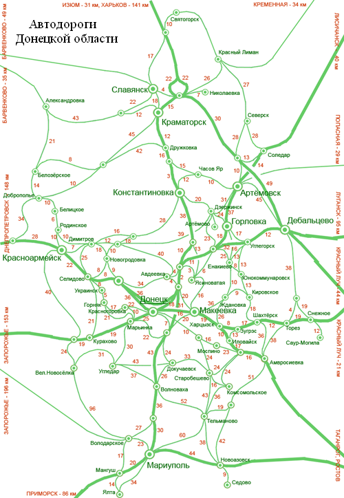 Donetsk_obl_roads map На карте не отмечено расстояние между городами: Красный Лиман - Святогорск - 24 км, Дзержинск - Артёмово - 6 км.